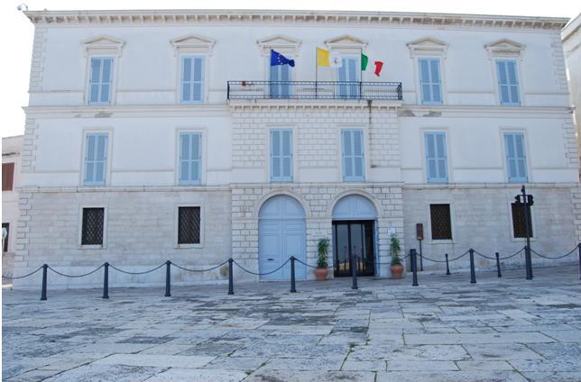 Facciata Museo Diocesano